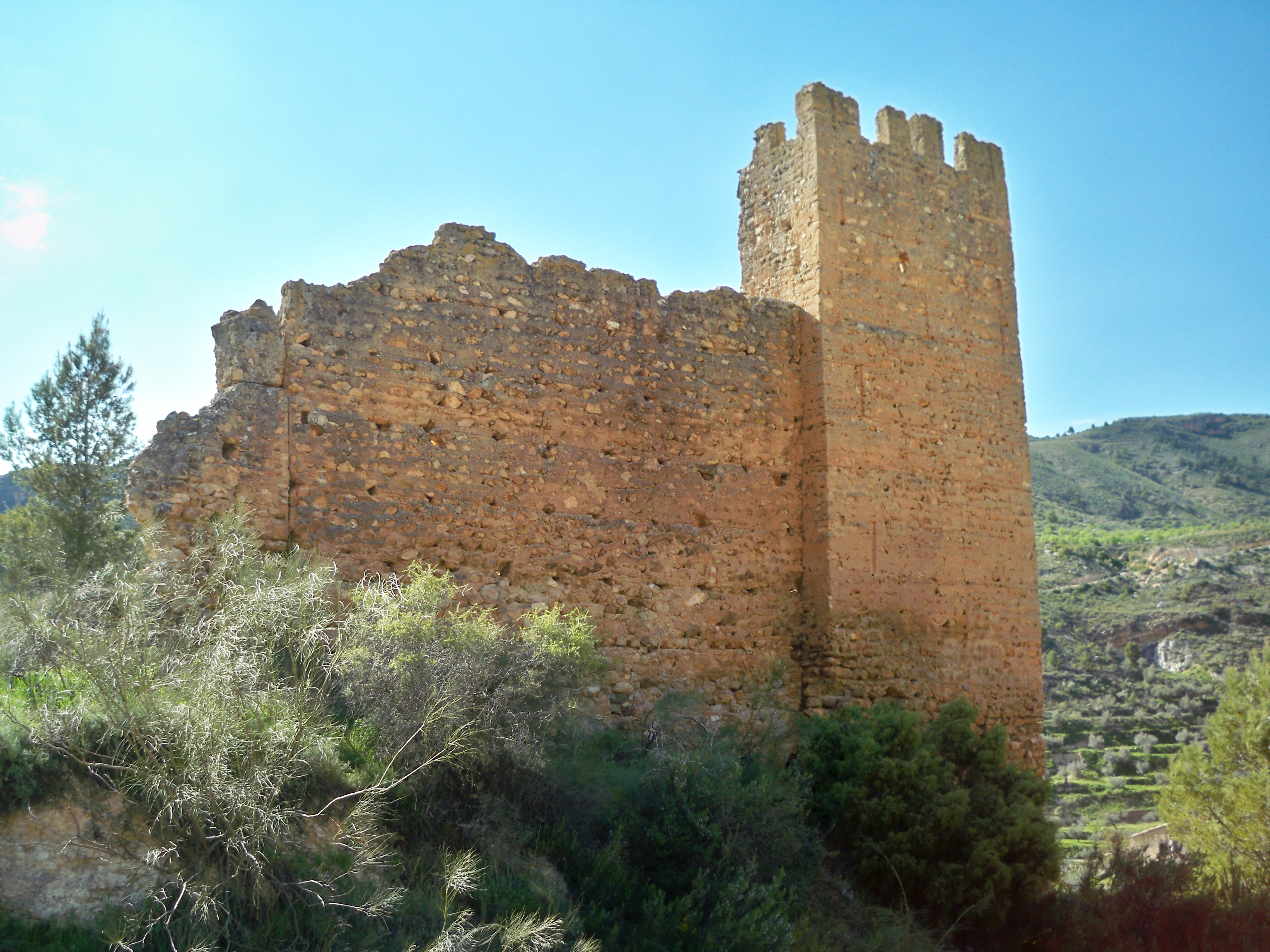 Fotografía de las ruinas del Castillo árabe de Las Huertas en el municipio de Molinicos (Albacete)